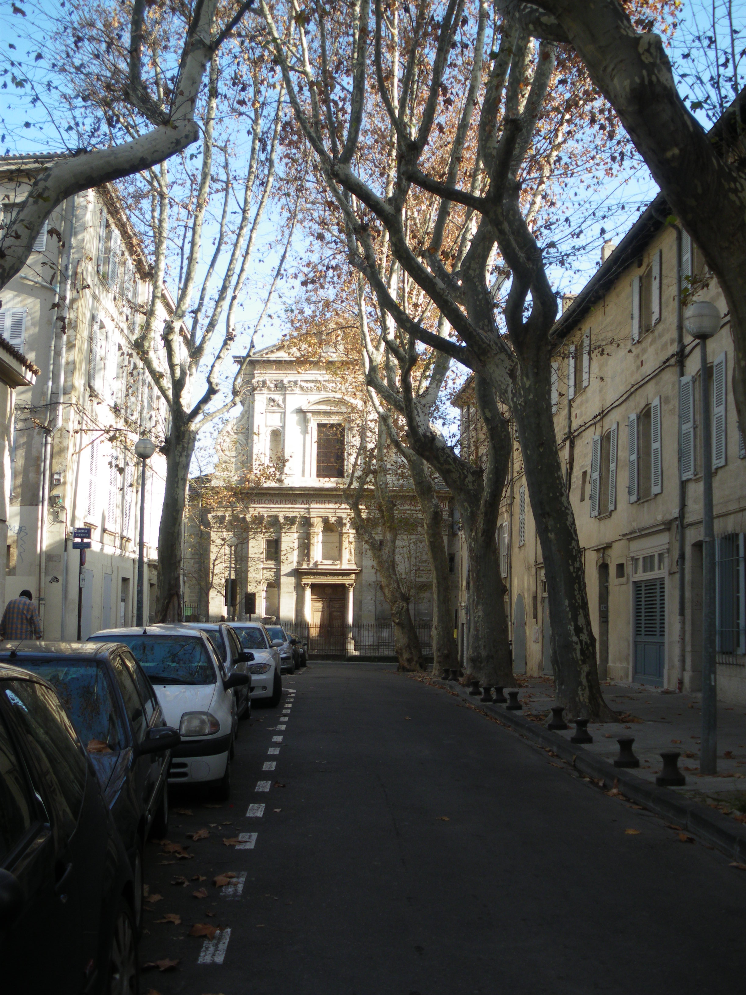 Place Pignotte, avec vue vers la chapelle de la Visitation